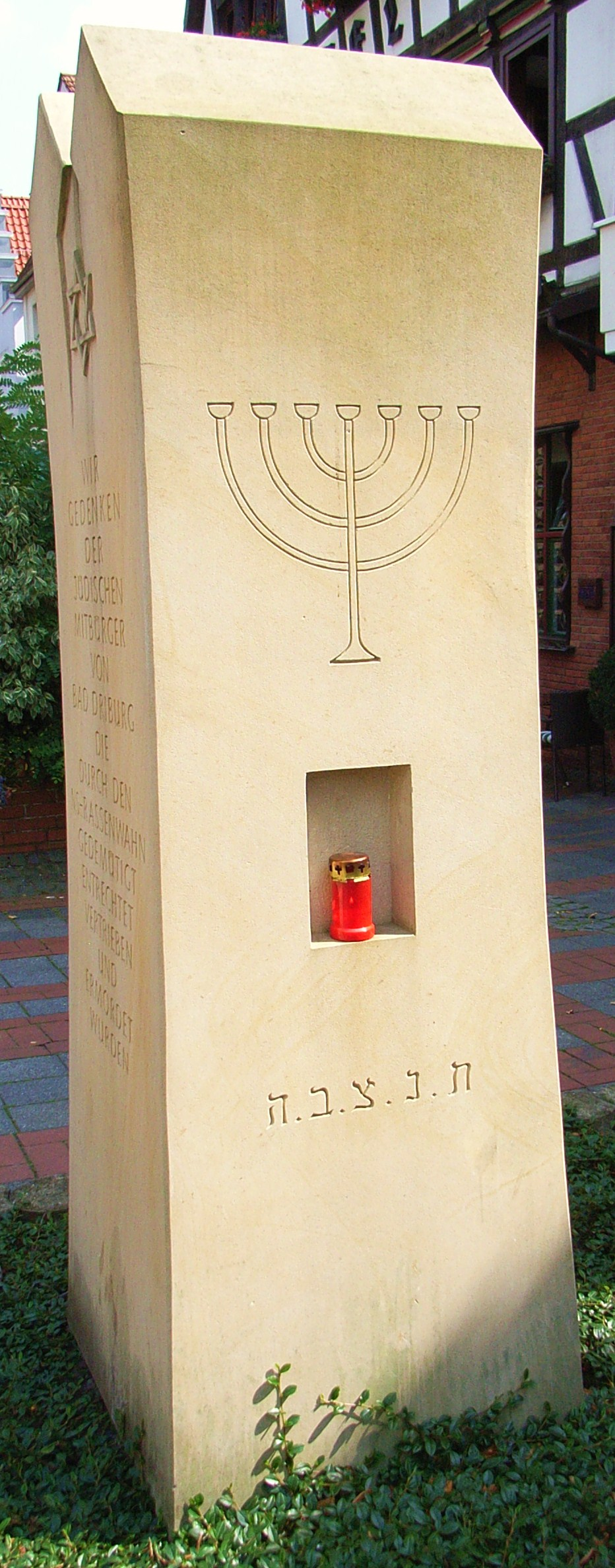 Gedenkstätte für die in der Nazi-Zeit ermordeten jüdischen Bad Driburger Bürger. Von Westen.